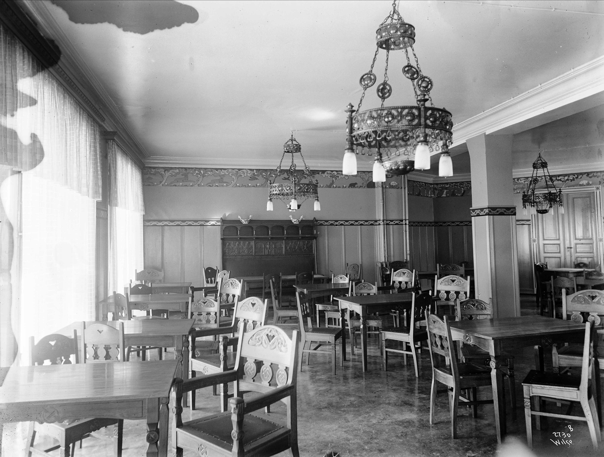 Kaffistova, Stortorvet, kafe, interiør, lysekroner, treskurd